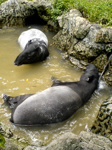 Dusit Zoo Tapir